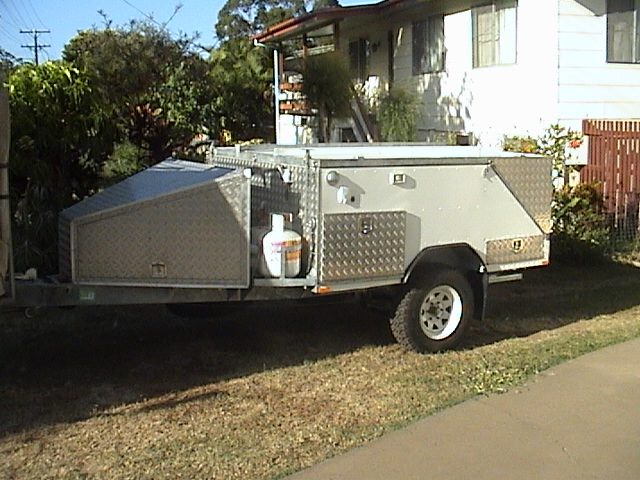 Custom made Camper Trailer